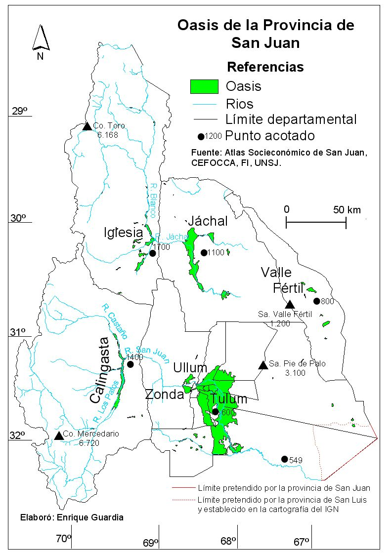 Mapa de la Provincia de San Juan, ubicada aproximadamente en el centro oeste de Argentina, que representa la distribución de sus respectivos oasis.